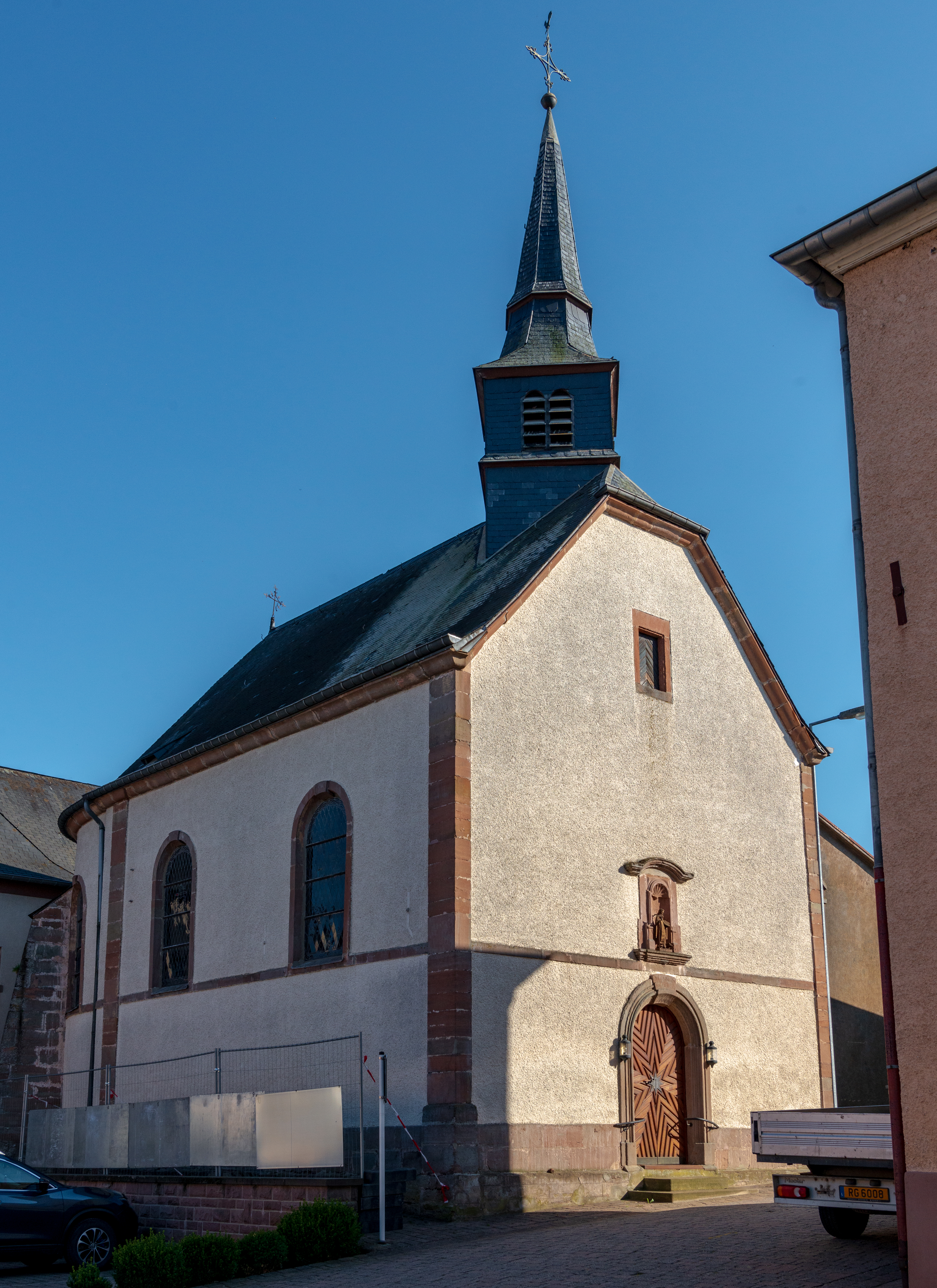 D'Kapell Uewerfeelen.